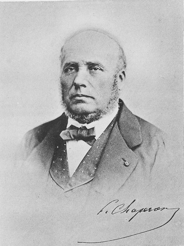 Chaperon (1808 - 1879), ingénieur des Ponts & Chaussées